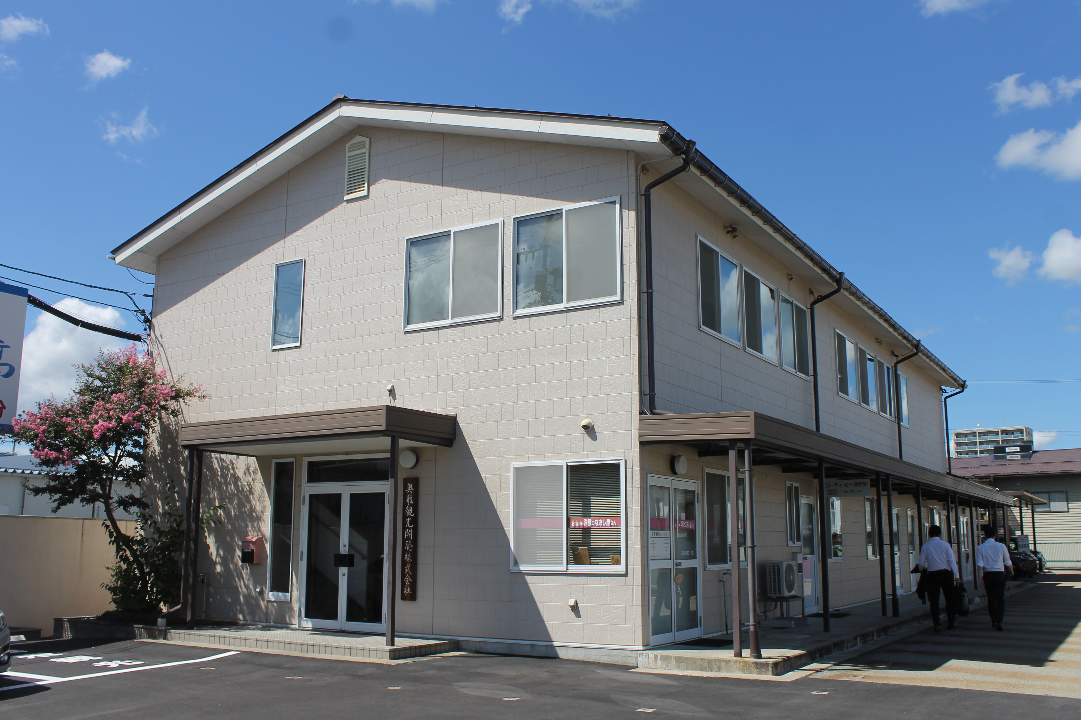 岐阜県高山市にある奥飛観光開発の本社。